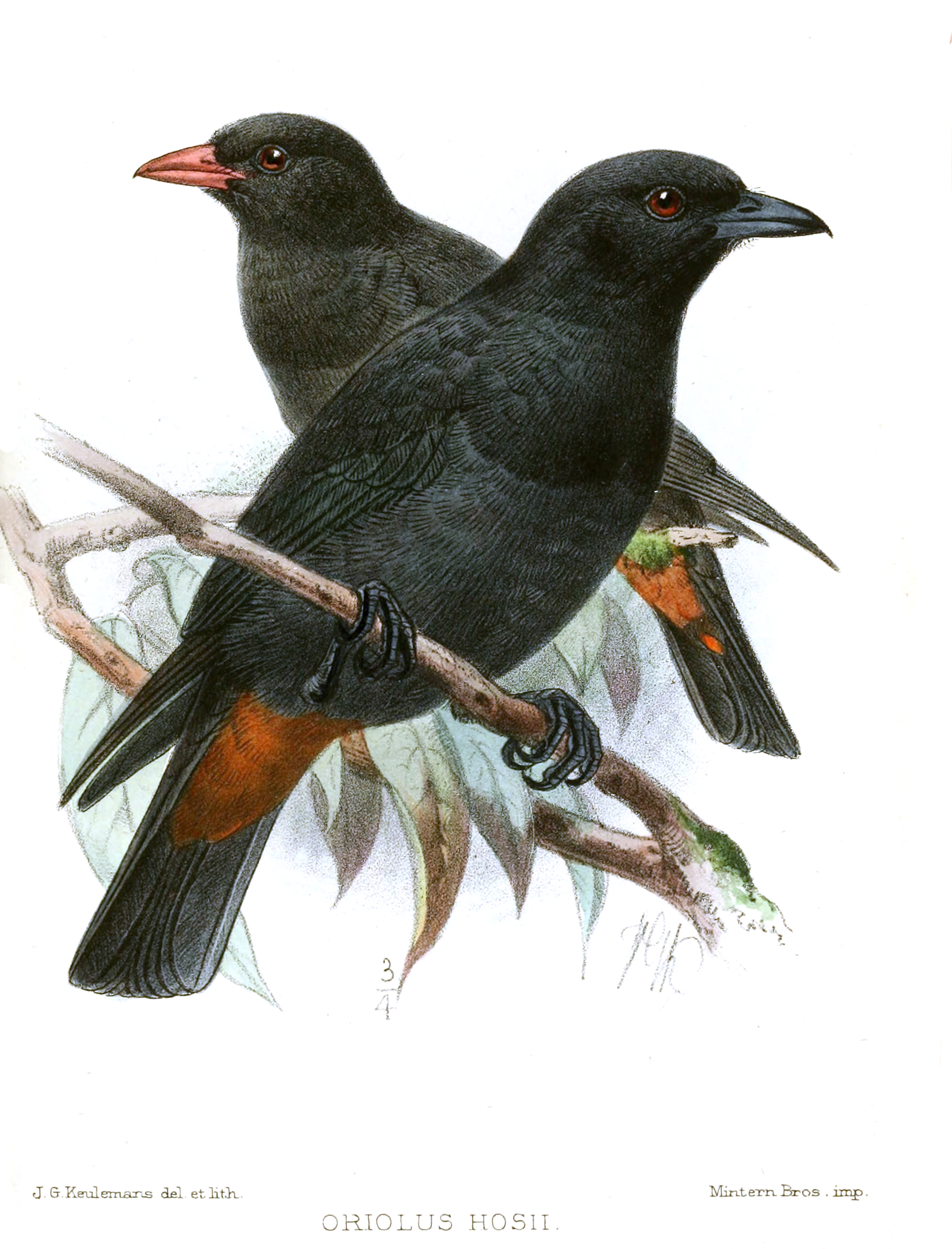 Oriolus hosii